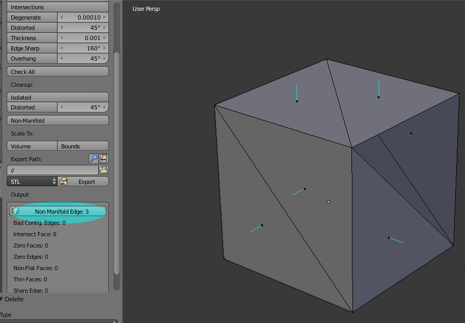 STL with missing face. Make with Blender.